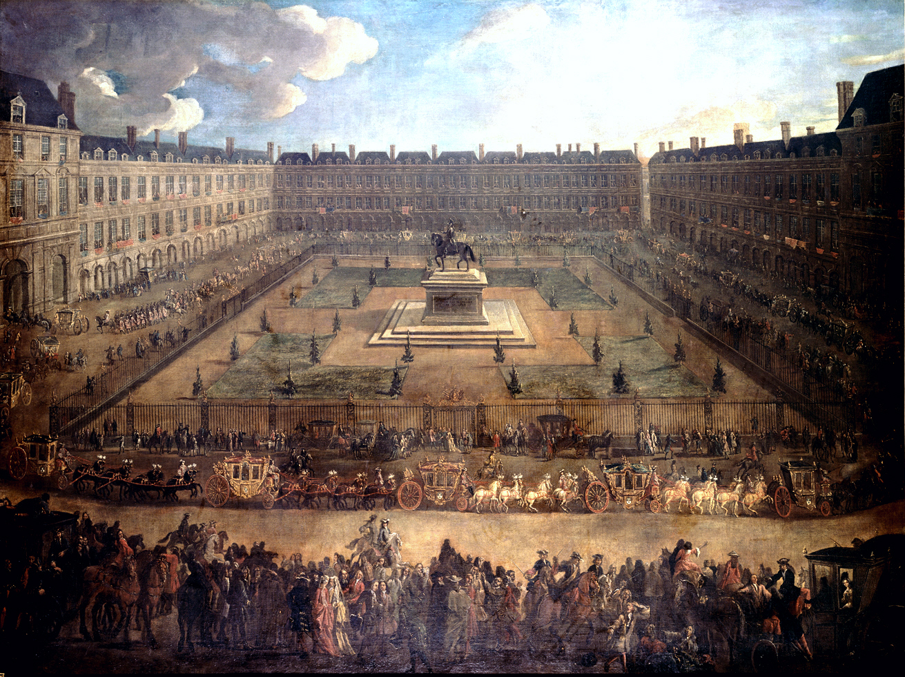 Einzug des venezianischen Botschafters Alvise Mocenigo in Paris am 20. Januar 1709, Leinwand, 198 x 265 cm. Versailles, Musée du Château